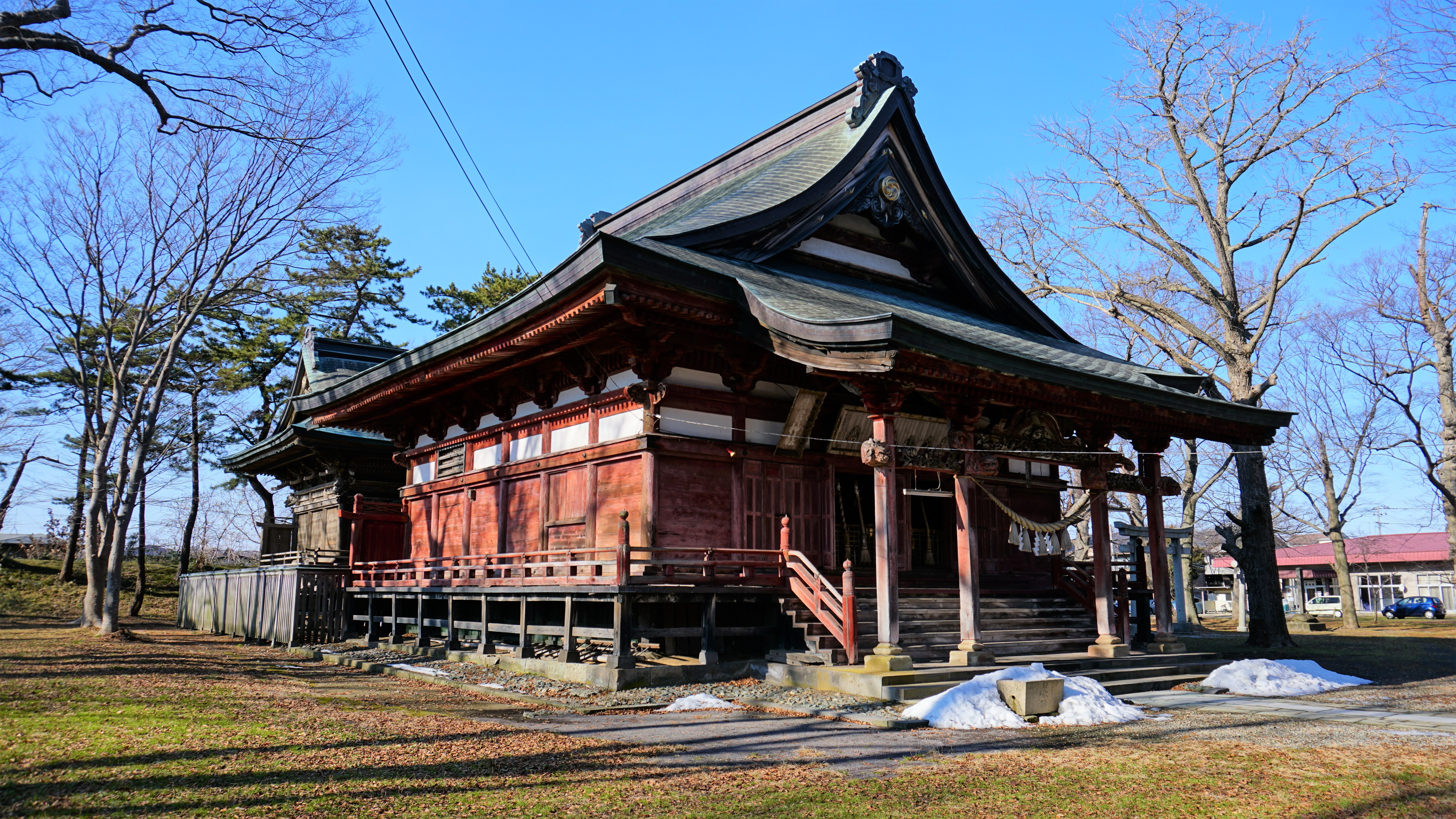 日吉八幡神社（秋田市八橋本町）社殿